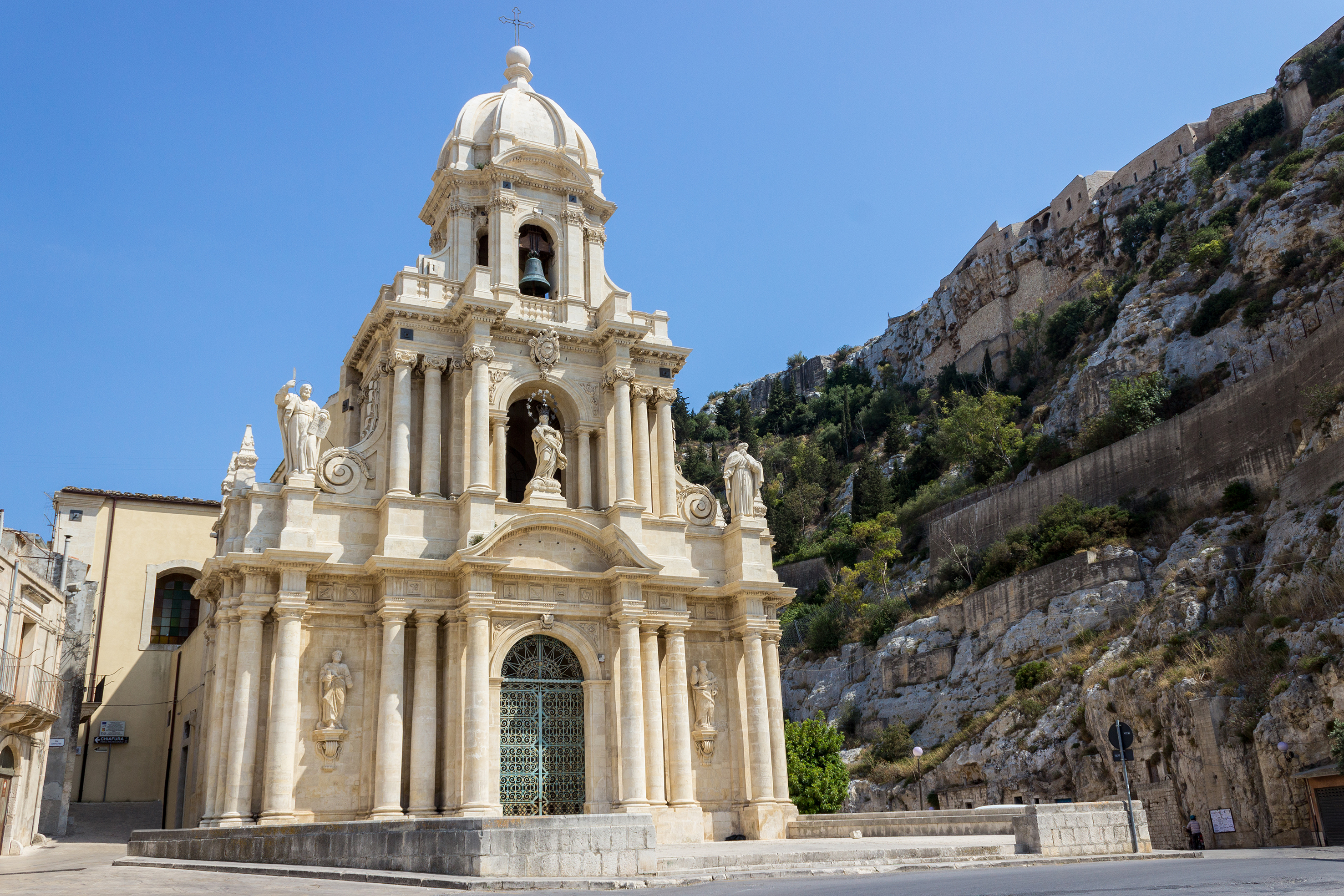 Chiesa di San Bartolomeo (solo esterni) This is a photo of a monument which is part of cultural heritage of Italy.